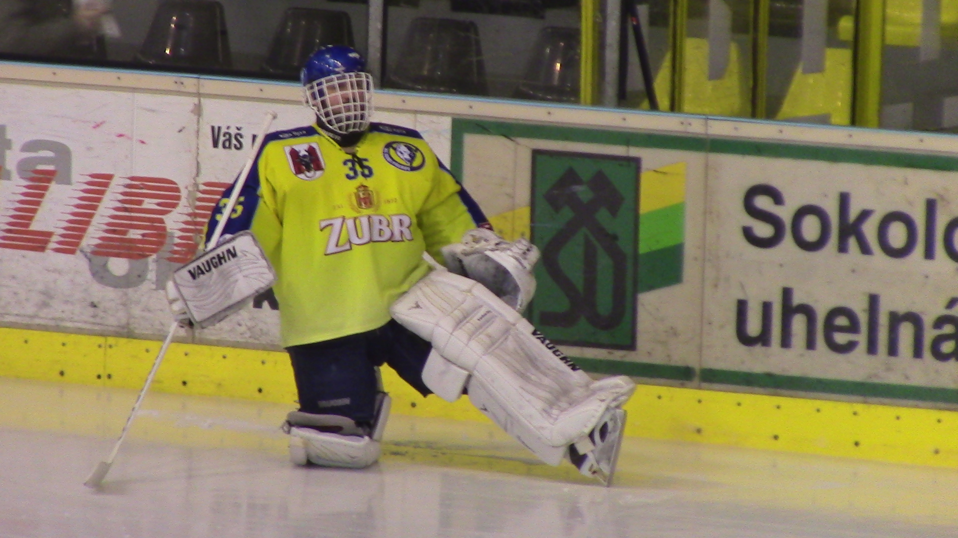 Martin Vojtek